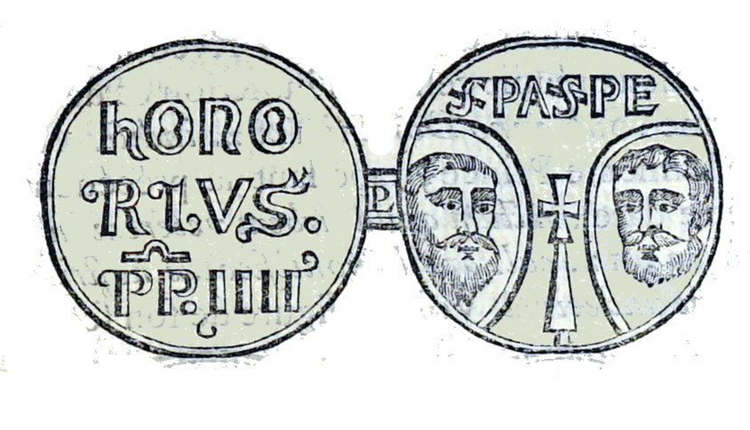 extrait de "Nouveau traité de diplomatique, ...".